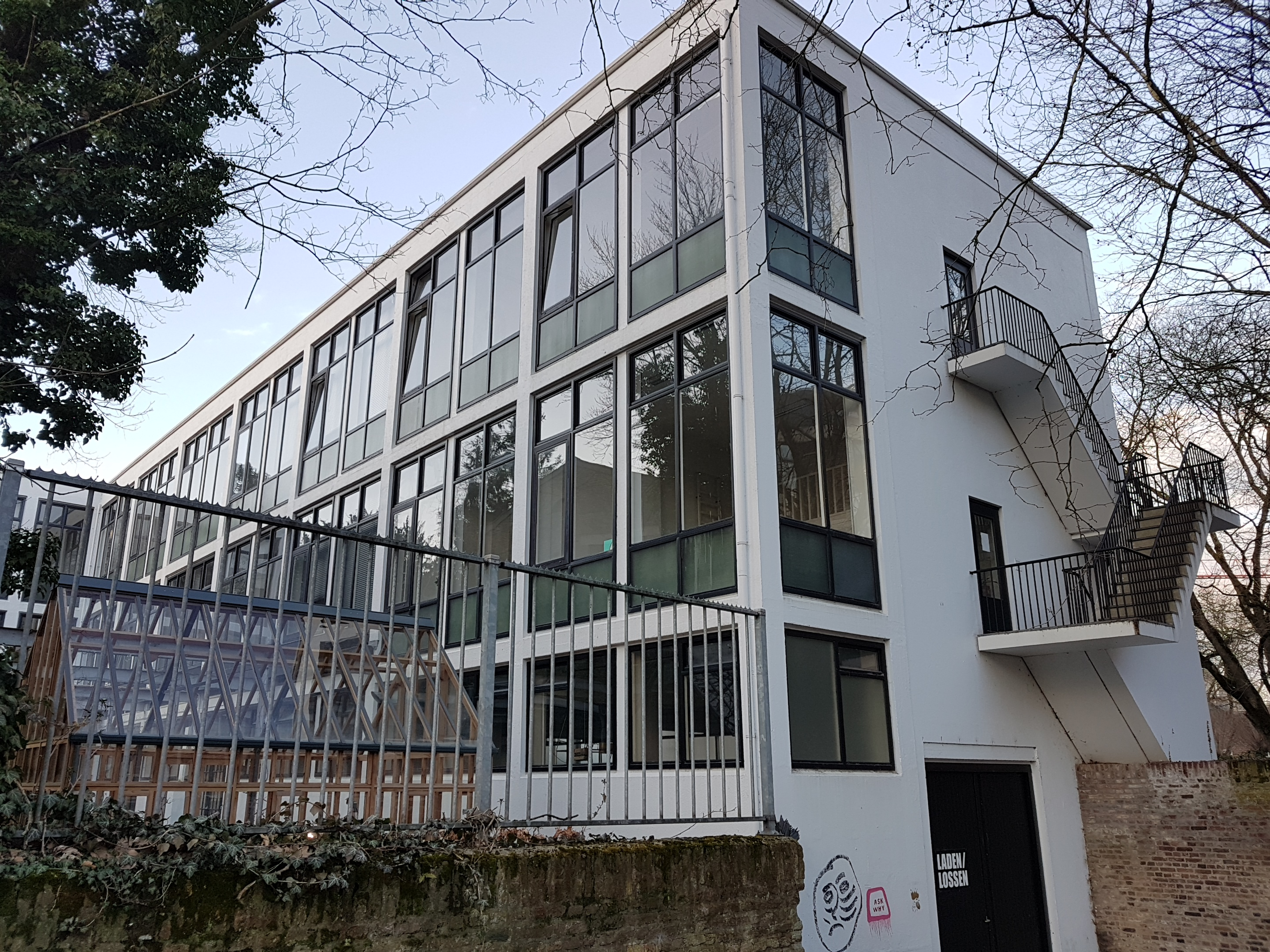 Zicht vanuit het zuidwesten op de westvleugel van de Jan van Eyck Academie, een post-academisch opleidingsinstituut voor beeldend kunstenaars in het Jekerkwartier in Maastricht.